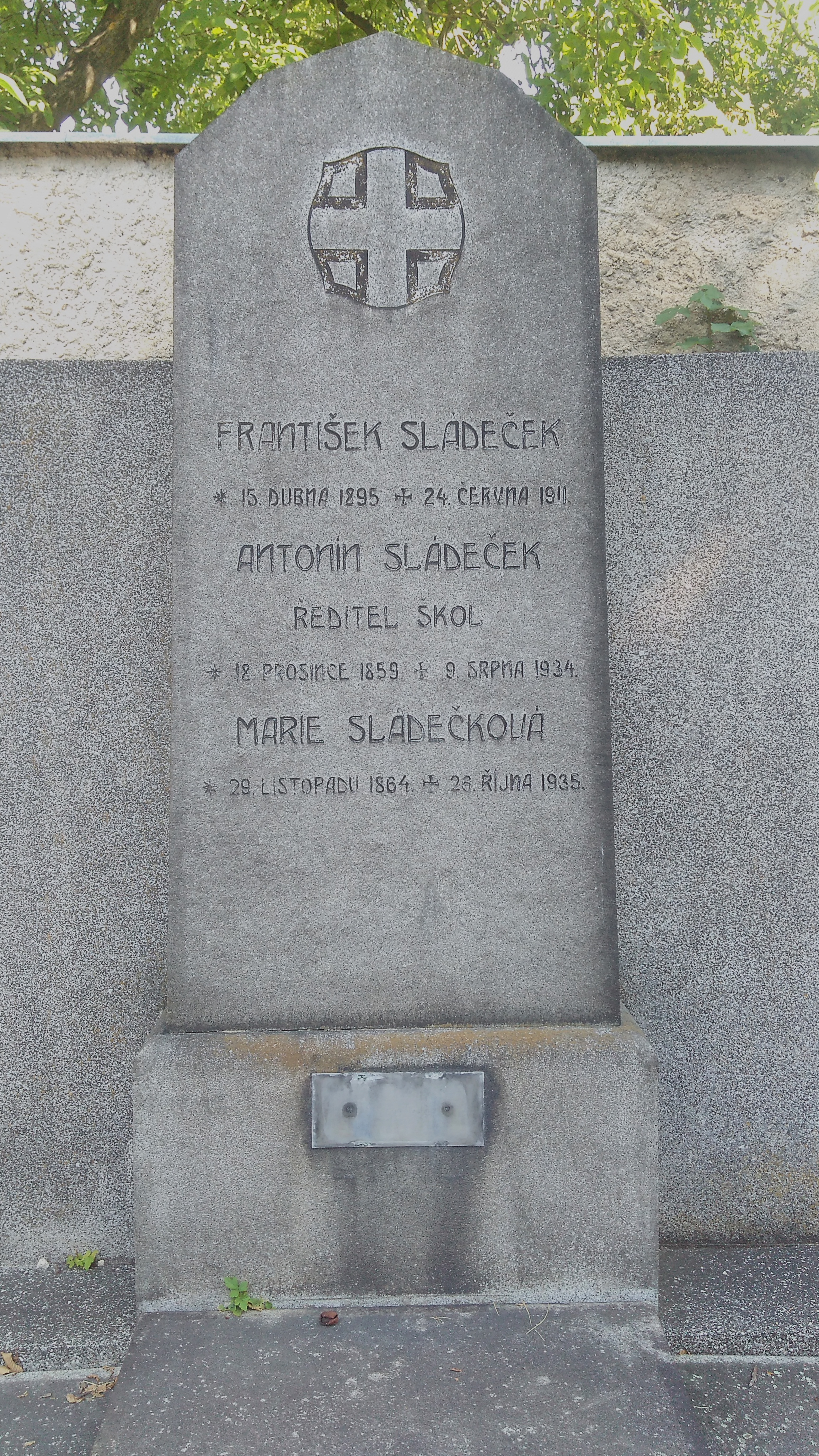 náhrobek